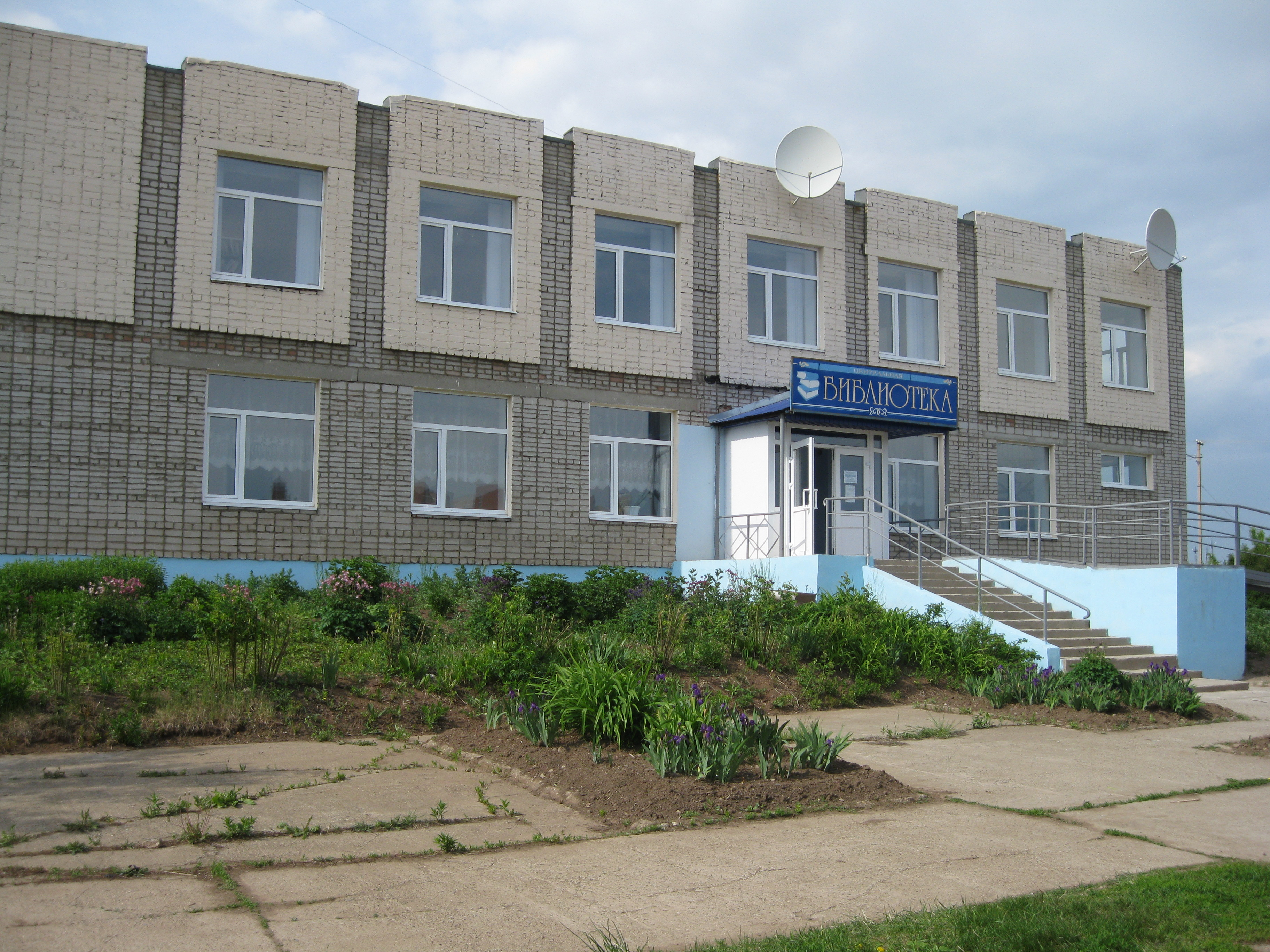 Здание Чернушинской центральной районной библиотеки